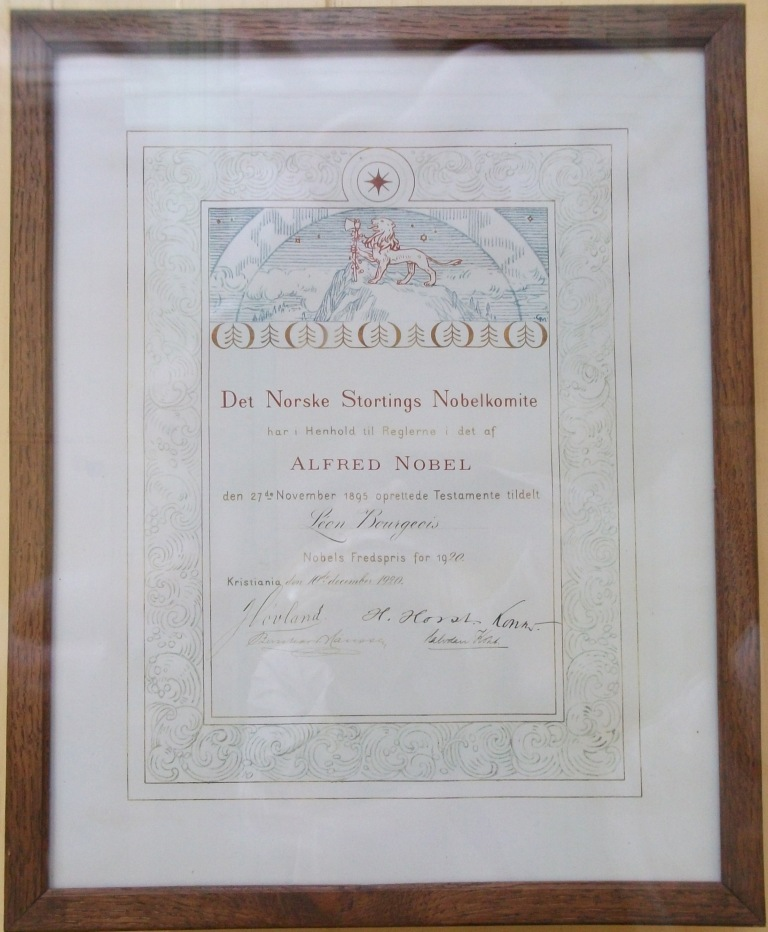 le diplôme du prix Nobel de 1920 décerné à Léon Bourgeois; musée de Châlons.